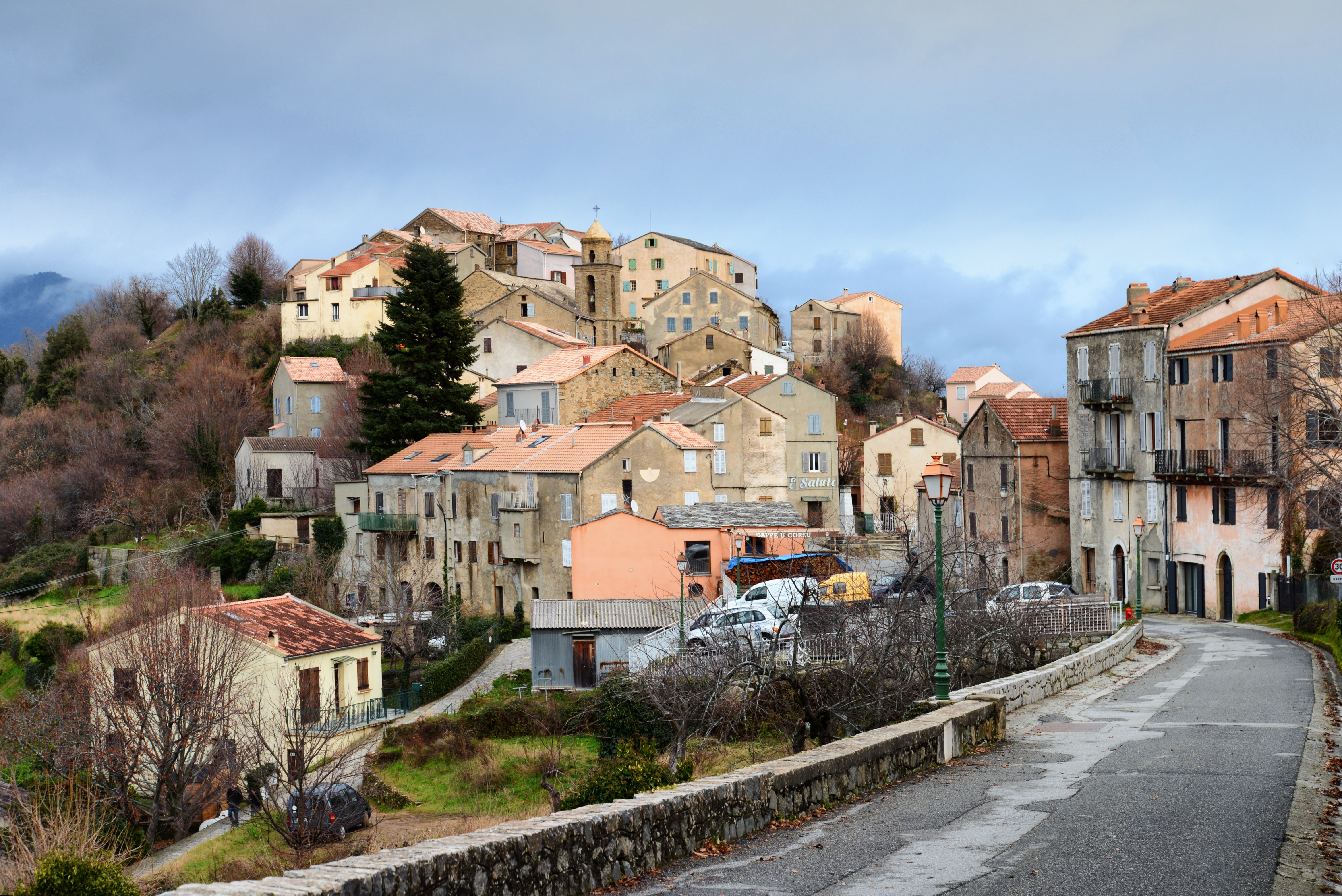 Riventosa, Venacais (Corse) - Vue hivernale du village, un jour de pluie